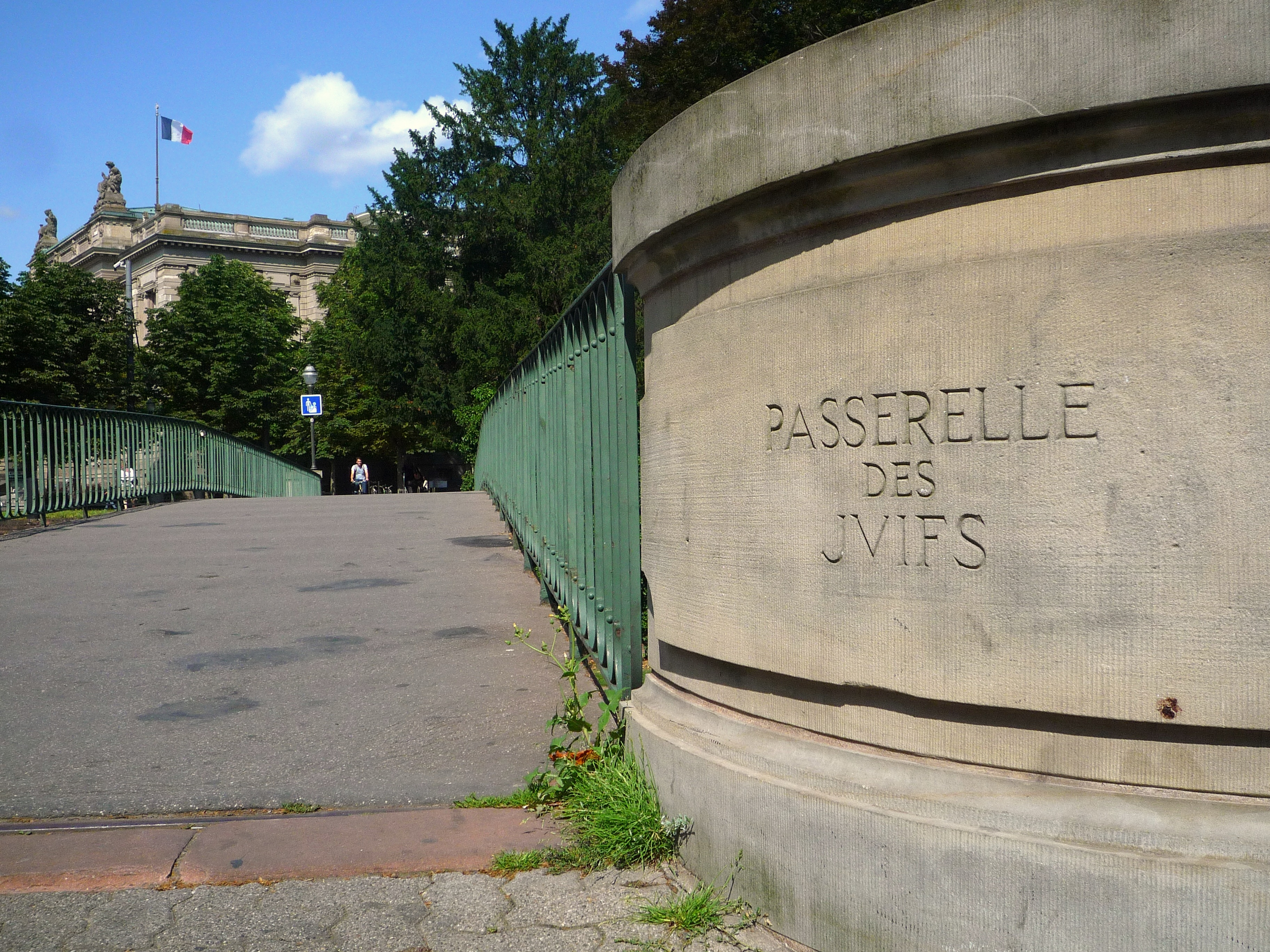 Strasbourg, la passerelle des Juifs qui enjambe l’Ill du quai Lezay-Marnésia à la place de la République. C’est à cet endroit que se trouvait au Moyen-âge la Porte des Juifs de l’ancienne enceinte de la ville qui menait au cimetière juif situé à cet emplacement et où furent brûlés les Juifs à la suite de l’épidémie de peste noire, lors de la Saint Valentin en 1349 .